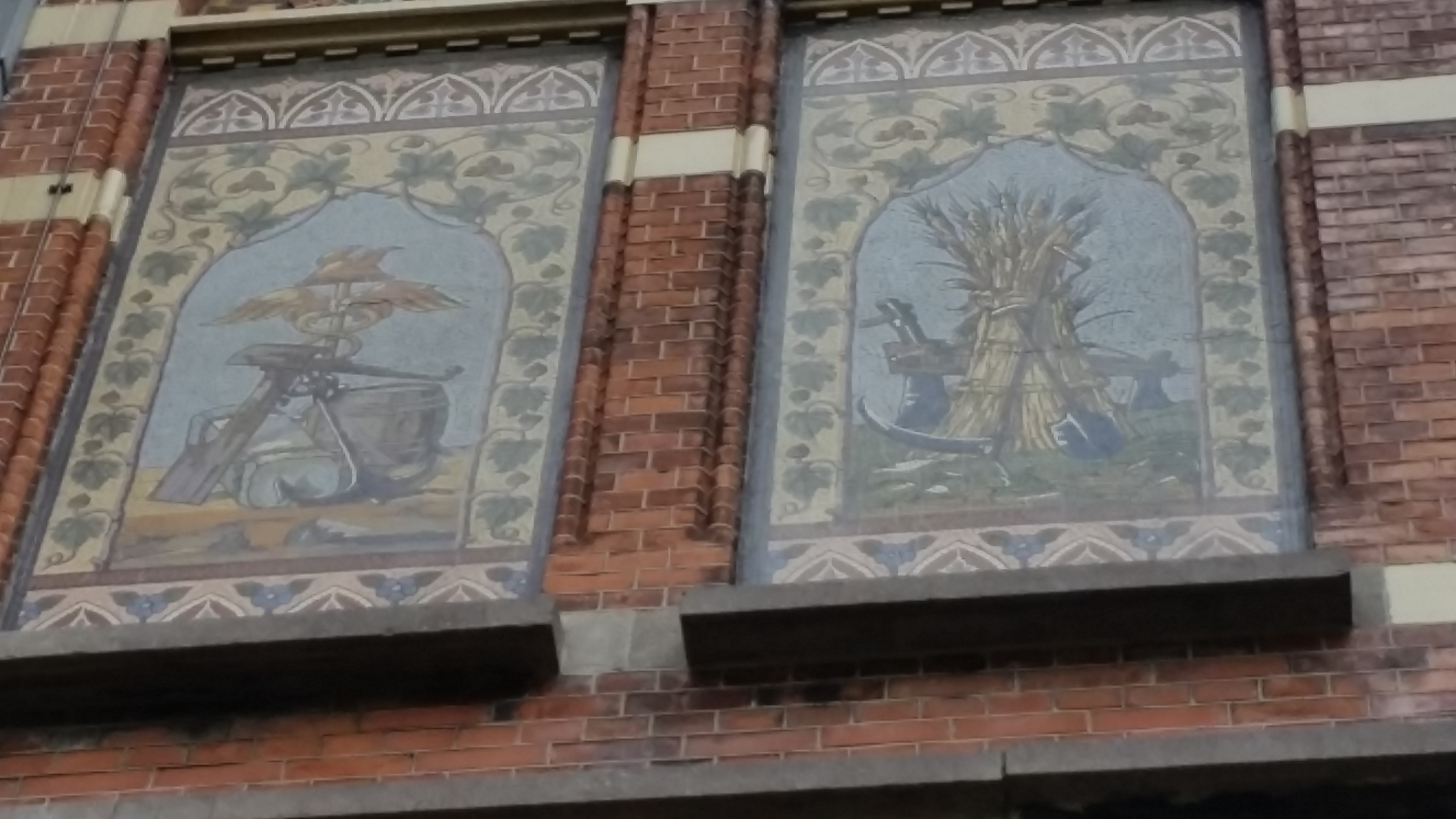 Tegeltableaus van Villa Heineken (Amsterdam)